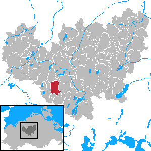 Zehna in Mecklenburg-Vorpommern - District Güstrow